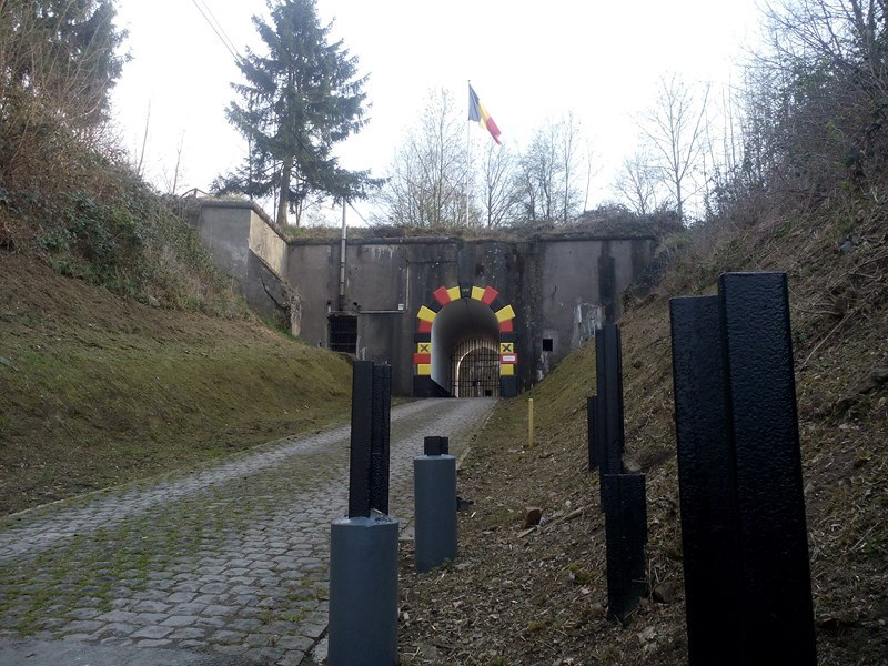 Entrée du Fort d'Embourg 2014